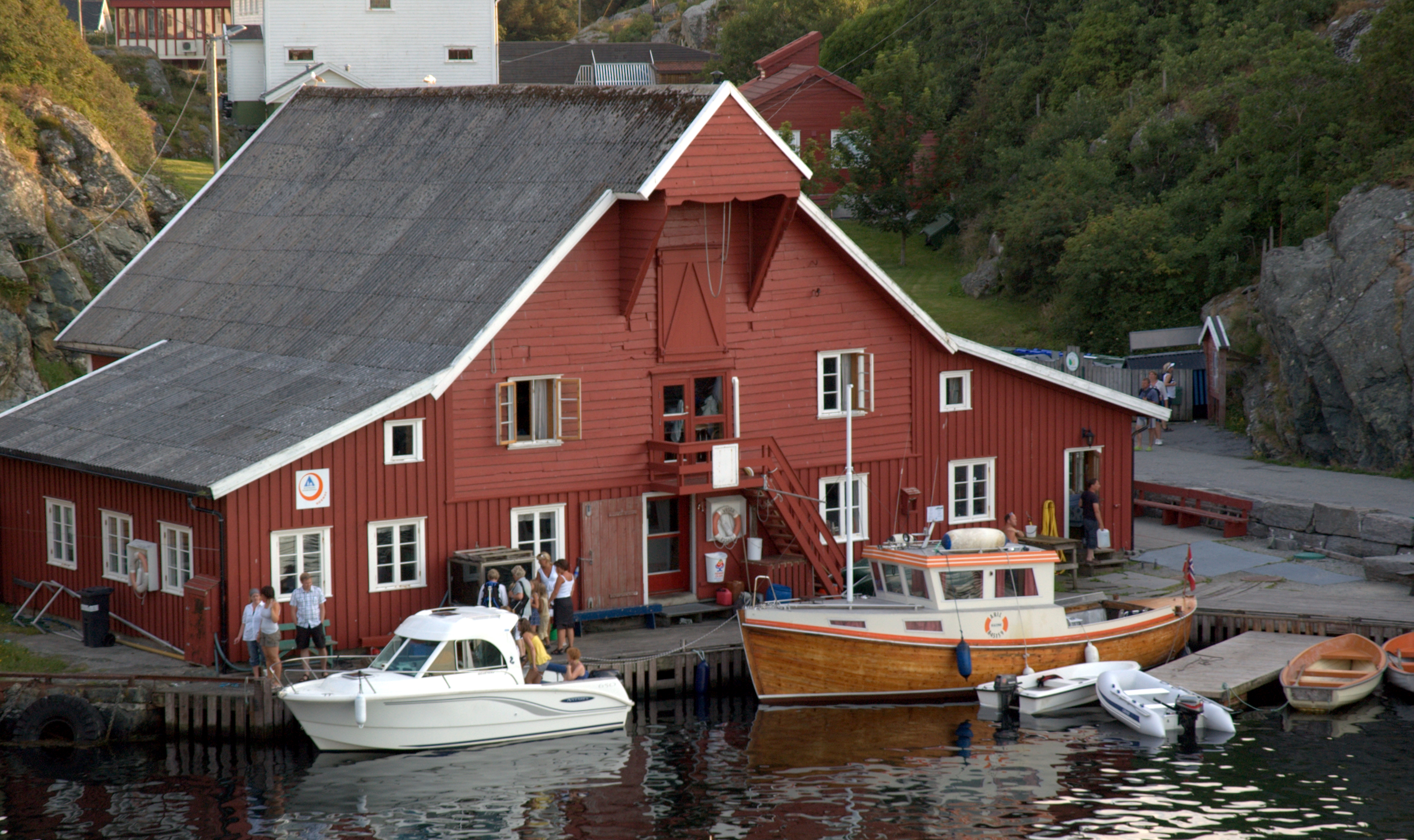 Røvær Sjøhus er et restaurert sjøhus fra 1800 tallet. Sjøhuset er eid av lokalbefolkningen på Røvær gjennom stiftelsen "Røvær Sjøhus".Vår og høst drives det leirskole for skoleklasser i Haugesund, helger og ferier drives det utleie. Sjøhuset brukes også som allaktivitetshus for Røværsbuen, her er bygdekino, høstfest, 17.mai-feiring, julebord m.m